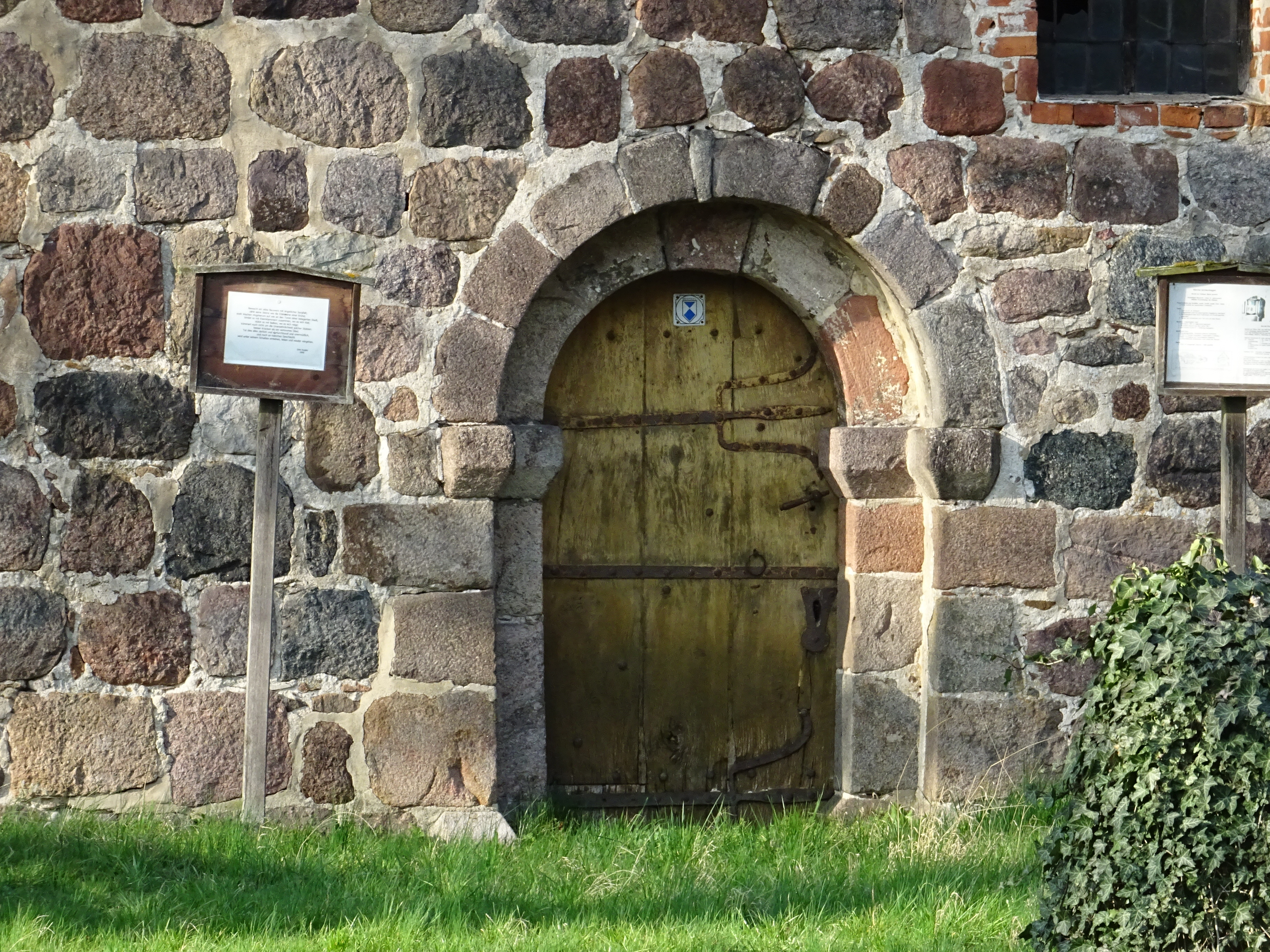 Dorfkirche Uchtenhagen, Stadt Osterburg, Portal auf der Südseite